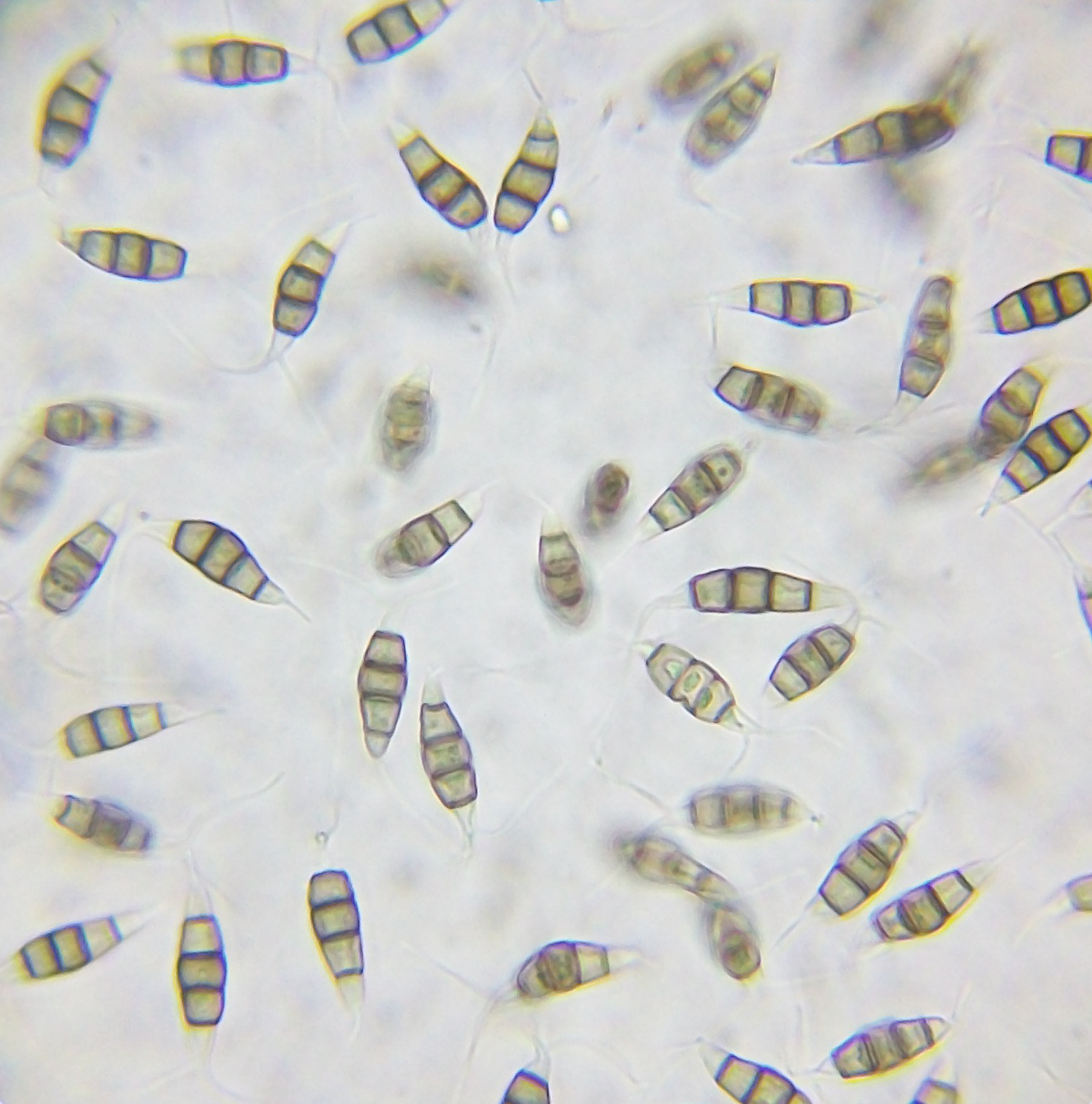 Spore di Pestalotiopsis microspora